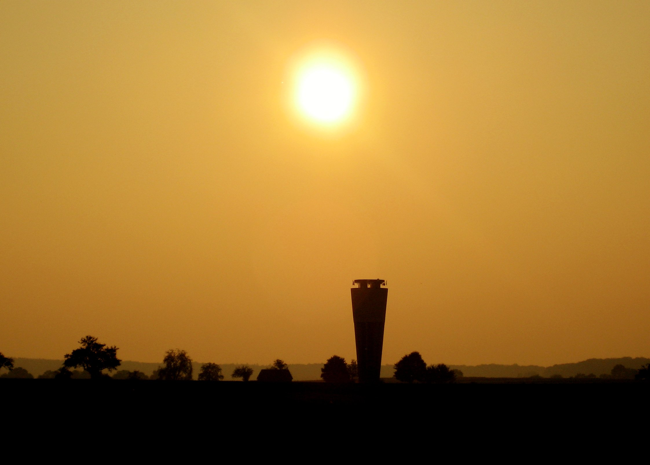 Ehemaliger Wasserturm der Gemeinde Altdorf (Kreis Böblingen)